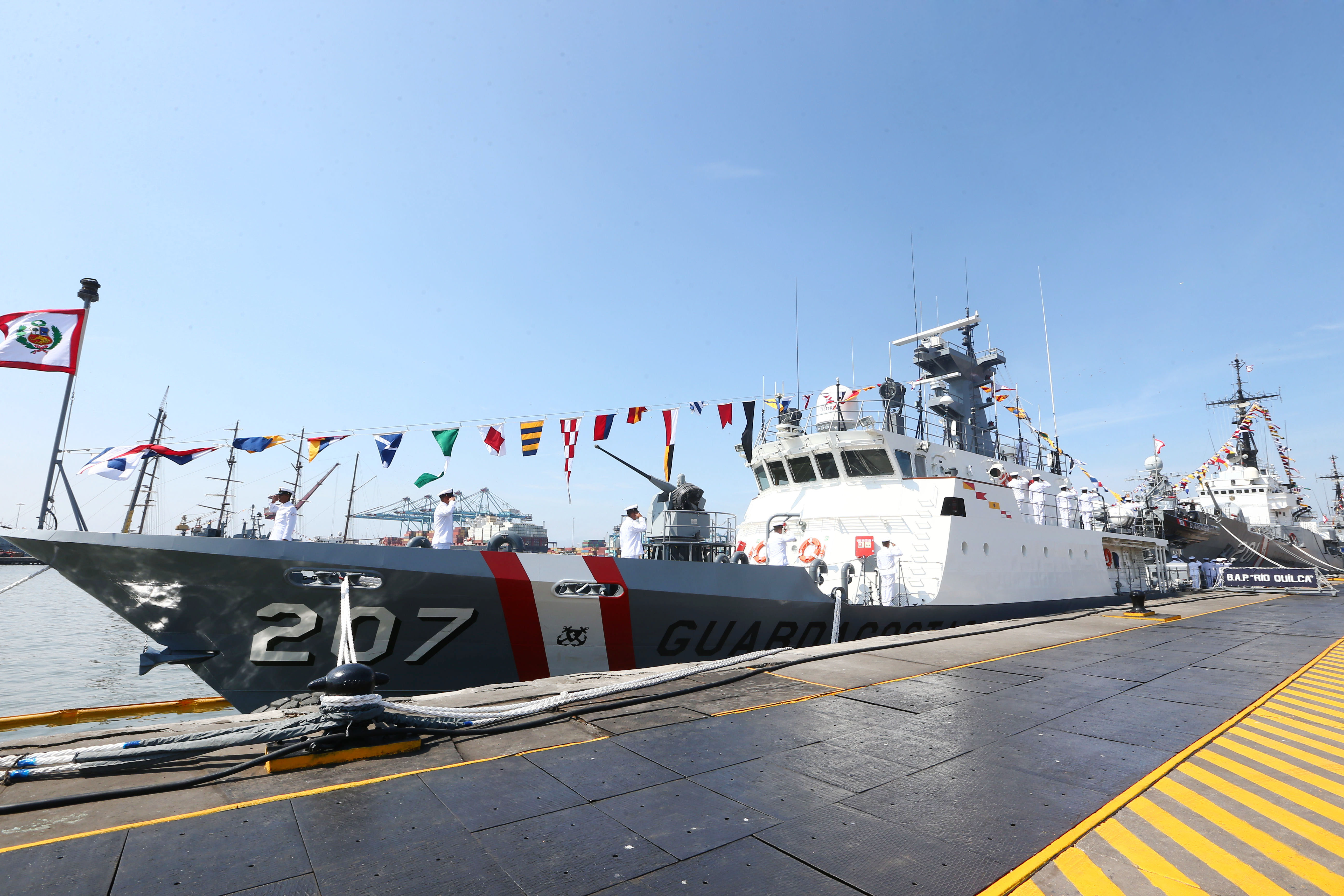 Durante la entrega de dos patrulleras construidas íntegramente por el SIMA. Ministro de Defensa, Jorge Nieto, participó en la ceremonia. El presidente de la República, Pedro Pablo Kuczynski, destacó la capacidad industrial del sector Defensa, durante la ceremonia de Afirmado del Pabellón Nacional de las nuevas patrulleras marítimas Río Piura y Río Quilca, que fueron construidas íntegramente por los Servicios Industriales de la Marina (SIMA). “Quiero resaltar la importancia industrial de estos dos barcos construidos en Chimbote, y habrá más, porque la tecnología, el empleo industrial, es el futuro del Perú; y tenemos muchas oportunidades más que debemos aprovechar en los próximos años”, señaló el Jefe de Estado durante la ceremonia celebrada en la Base Naval del Callao. El mandatario estuvo acompañado por el ministro de Defensa, Jorge Nieto Montesinos, el ministro de la Producción, Bruno Giuffra; y el comandante general de la Marina de Guerra, Almirante Gonzalo Ríos Polastri, entre otras autoridades. “Con gran satisfacción estoy aquí con ustedes para este lanzamiento, que es un símbolo de lo que puede ser el Perú: disciplina, orden, progreso. Felicitaciones a las dos tripulaciones, felicitaciones al SIMA, felicitaciones a la Marina”, señaló el presidente Kuczynski. De igual forma, reconoció el esfuerzo de la Armada Peruana de acercar los programas sociales del Estado a las comunidades más alejadas de la selva, mediante las Plataformas Itinerantes de Acción Social (PIAS), embarcaciones fluviales acondicionadas para esta tarea. Construidas íntegramente por el SIMA, las dos patrulleras, Río Piura y Río Quilca, tendrán también la misión de proteger y salvaguardar la vida humana en nuestro mar, además de realizar interdicciones contra el tráfico ilícito de drogas y la pesca ilegal. Lima, 3 de marzo de 2017 Oficina de Prensa Ministerio de Defensa 209 8530 Anexo 4155 ​